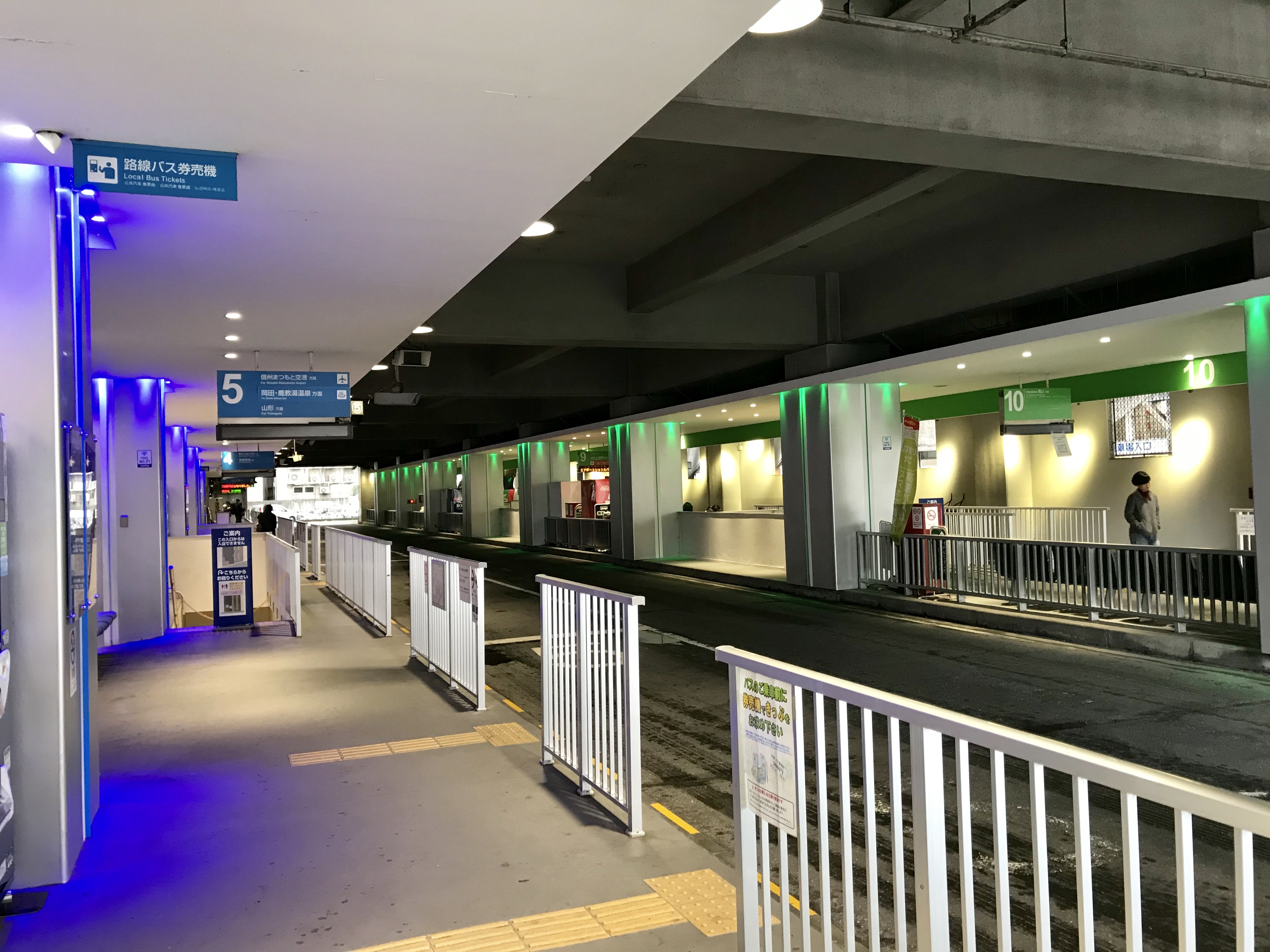 2017年現在の松本バスターミナル。